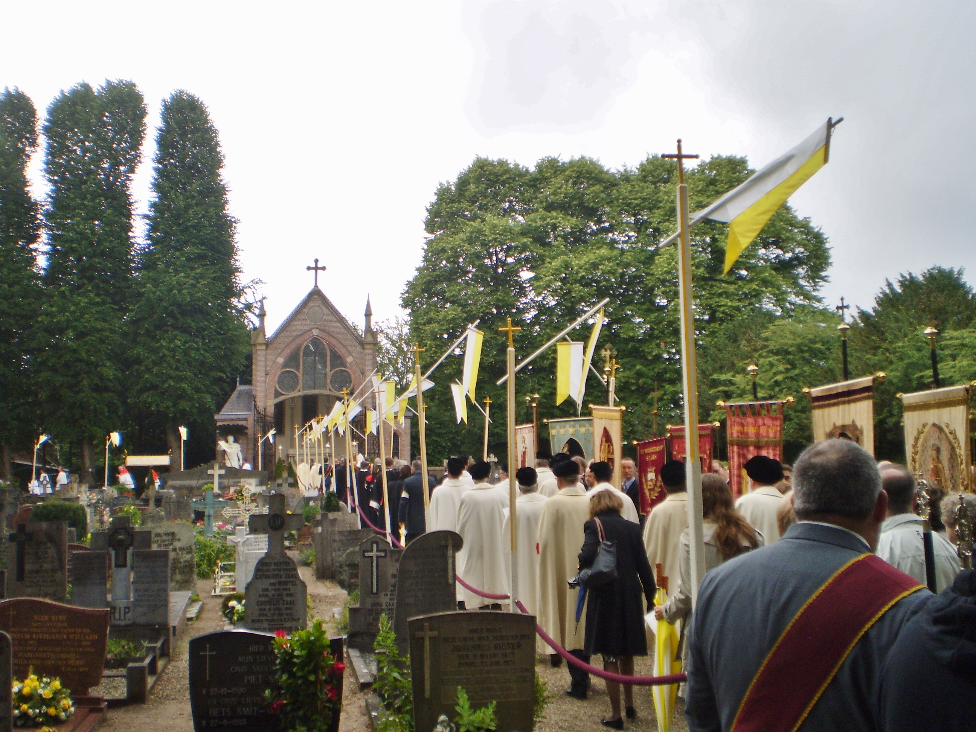 Sint Jansprocessie bij aankomst op het Sint Janskerkhof